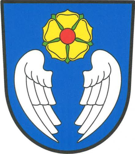 Bořetín (JH), znak. Ve zlato - modře děleném štítě nahoře dva vztyčení přivrácení černí medvědi s modrou zbrojí a jazyky, držící svěšený červený list gonfanonu se třemi cípy a třemi závěsnými kroužky, v něm stříbrná vykořeněná lekna, mezi nimi zlatý křížek. Dole dvě zlatá břevna.